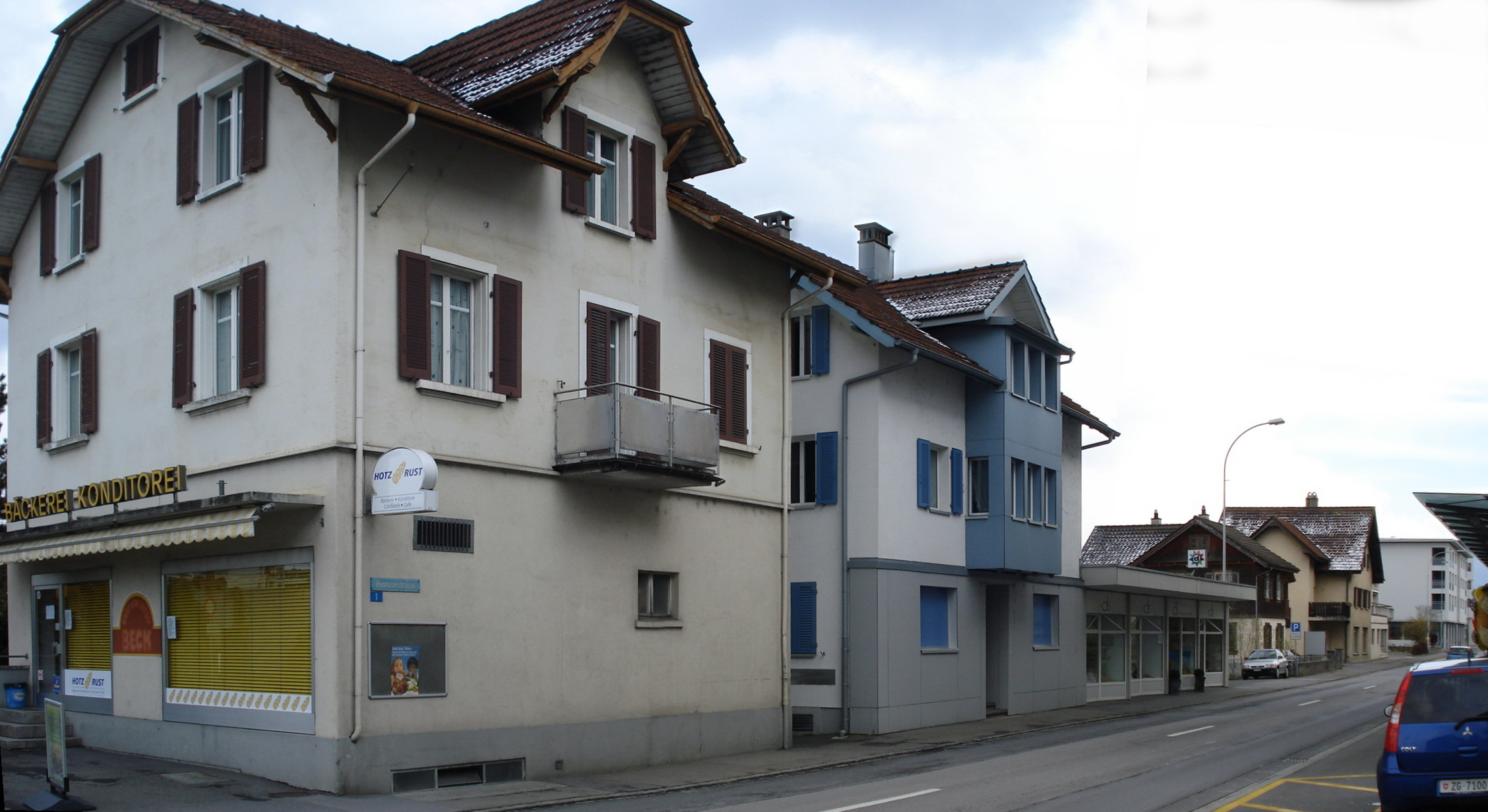 Rotkreuz